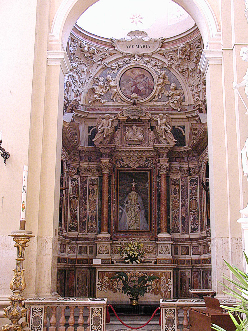 Chiesa della SS. Annunziata